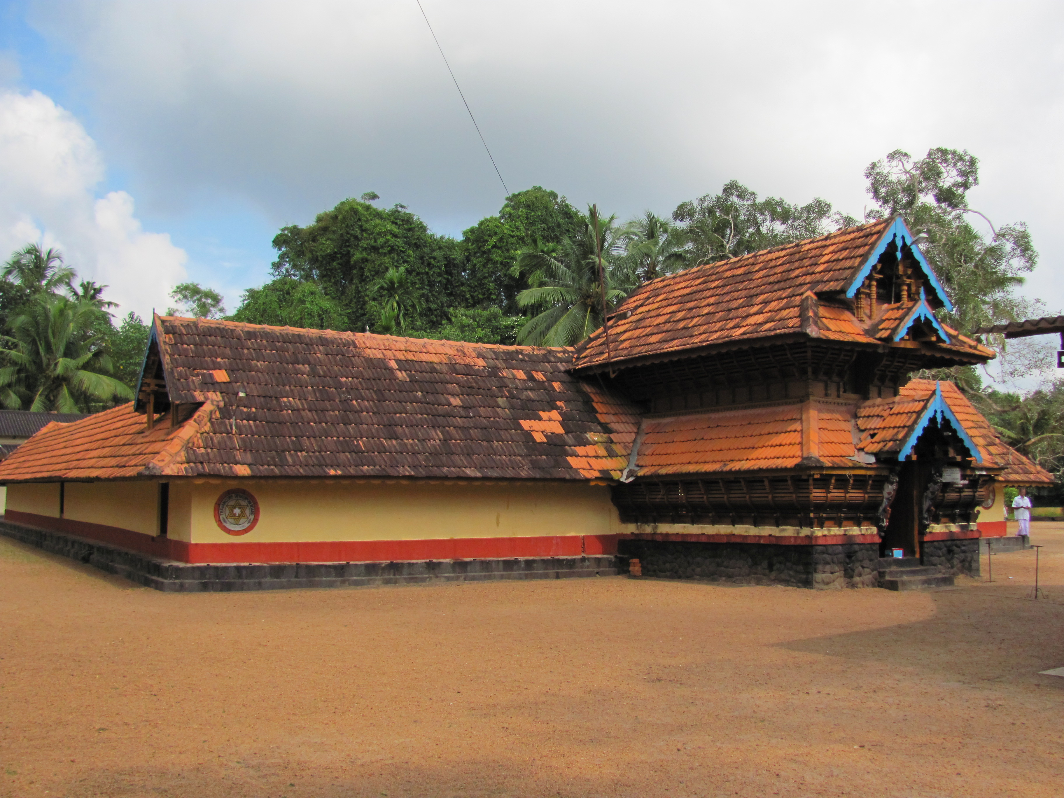 രാമപുരം ദേവീക്ഷേത്രം കീരിക്കാട്